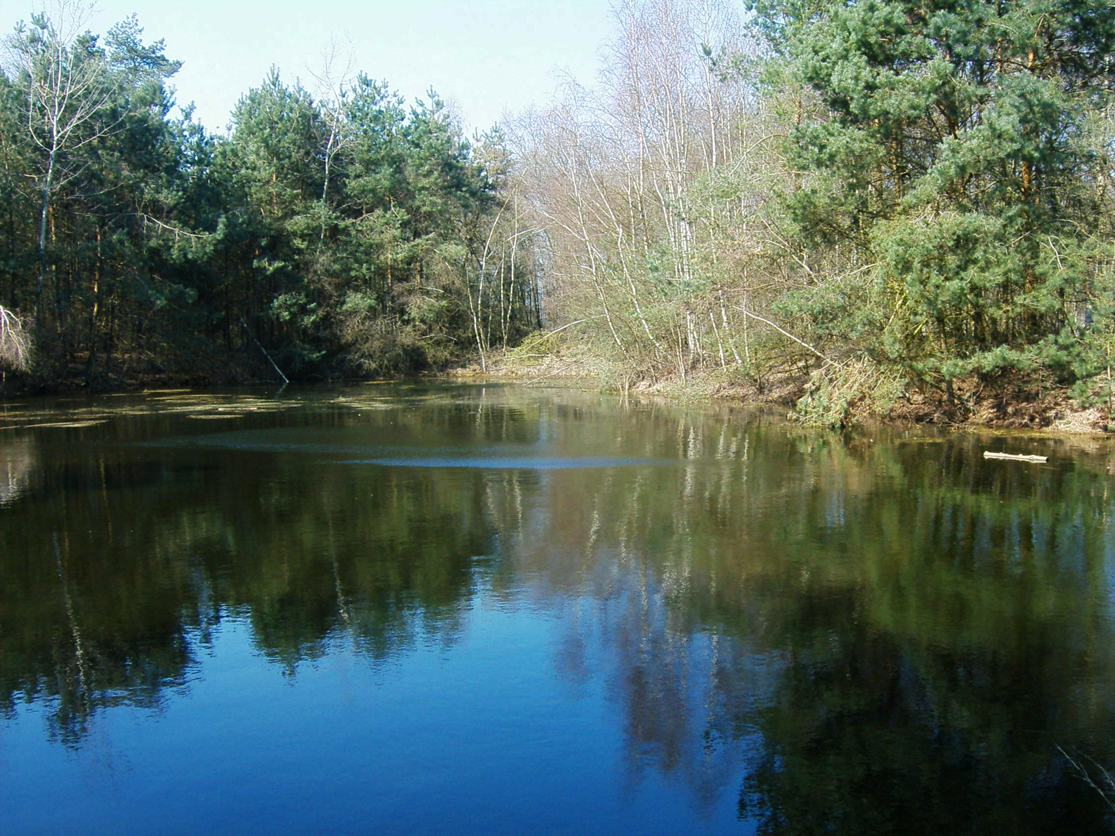 Kleiner See, versteckt in einem Wald. Hollich, Burgsteinfurt, Blick Richtung Norden kleiner See ca. 500 m östlich vom Grafensteiner See